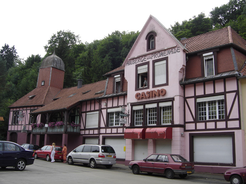 Casino vu Zowaasch. Allgemenges zum Bild: Dëst Bild weist de Casino vu Zowaasch. Besonnerheeten: am Zowaascher Casino goufen Deeler vum Film Le Club des Chômeurs gedréint.